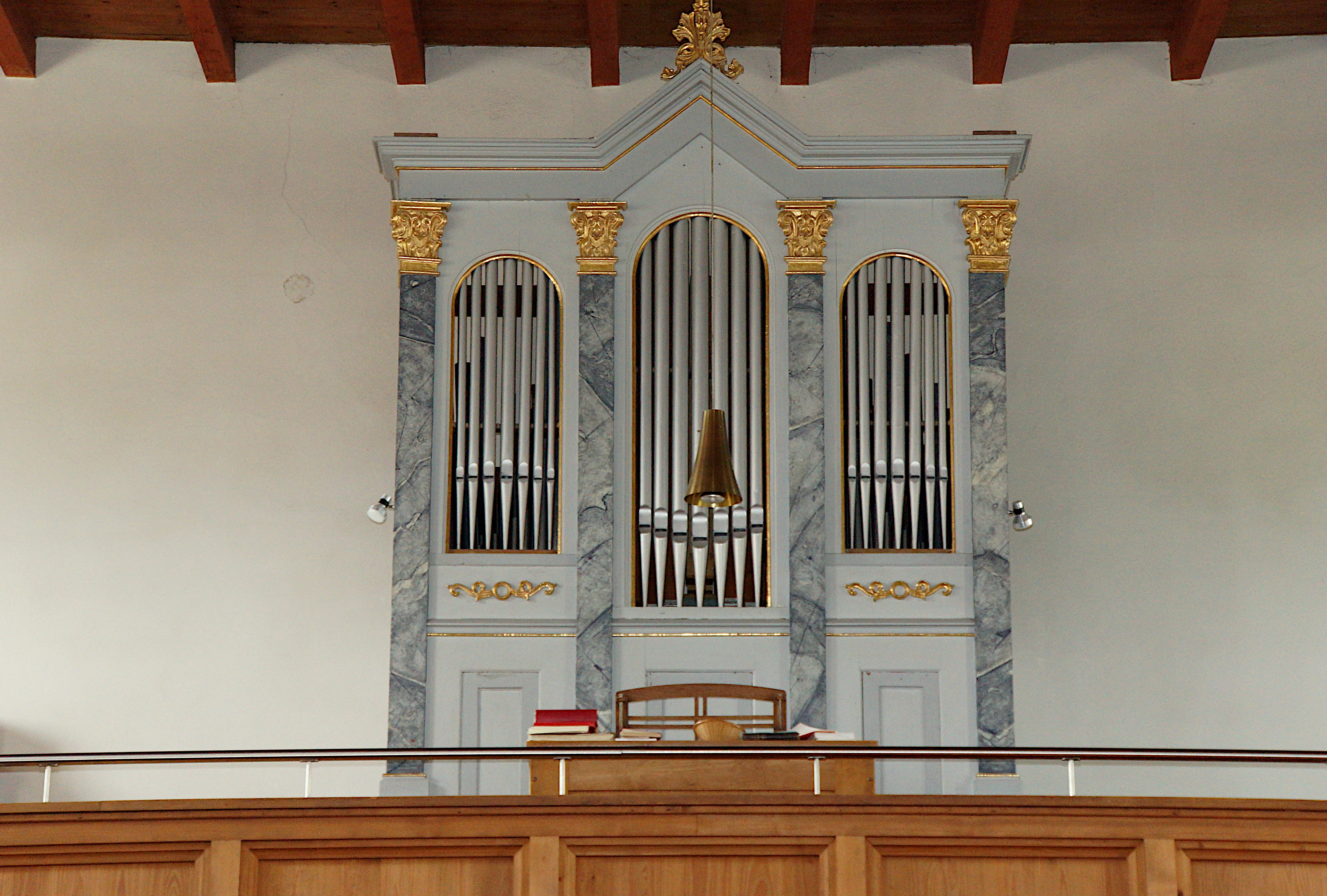 Die katholische Pfarrkirche Mariä Aufnahme in Daßwang bei Seubersdorf